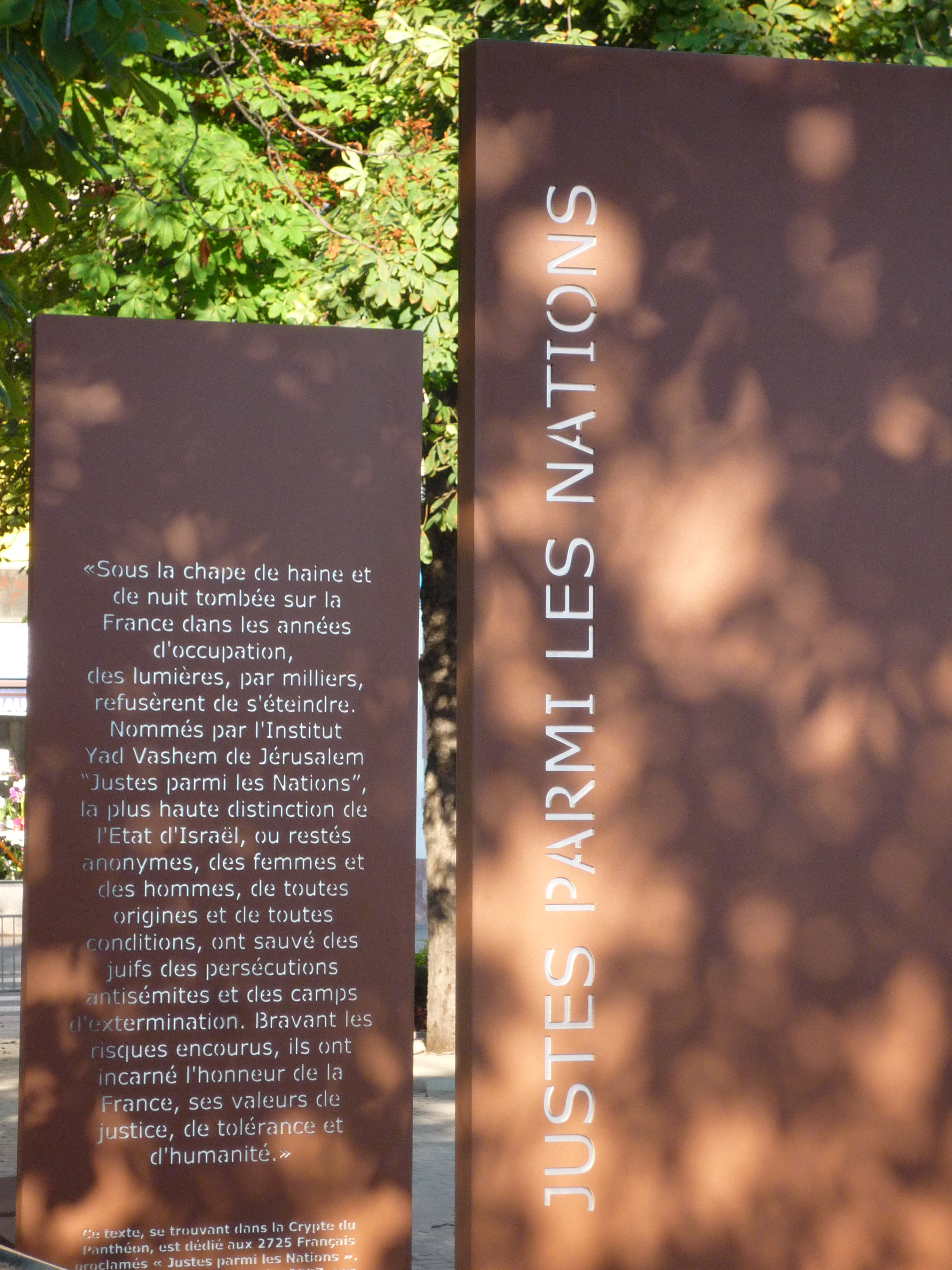 Strasbourg le monument de l’allée des Justes 02